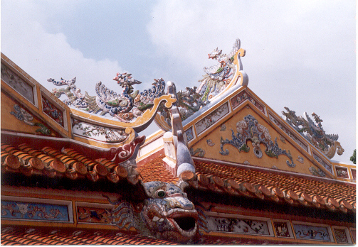 Hình tự chụp